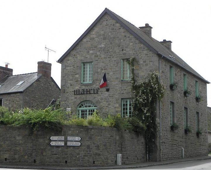 Mairie de Dingé (35).